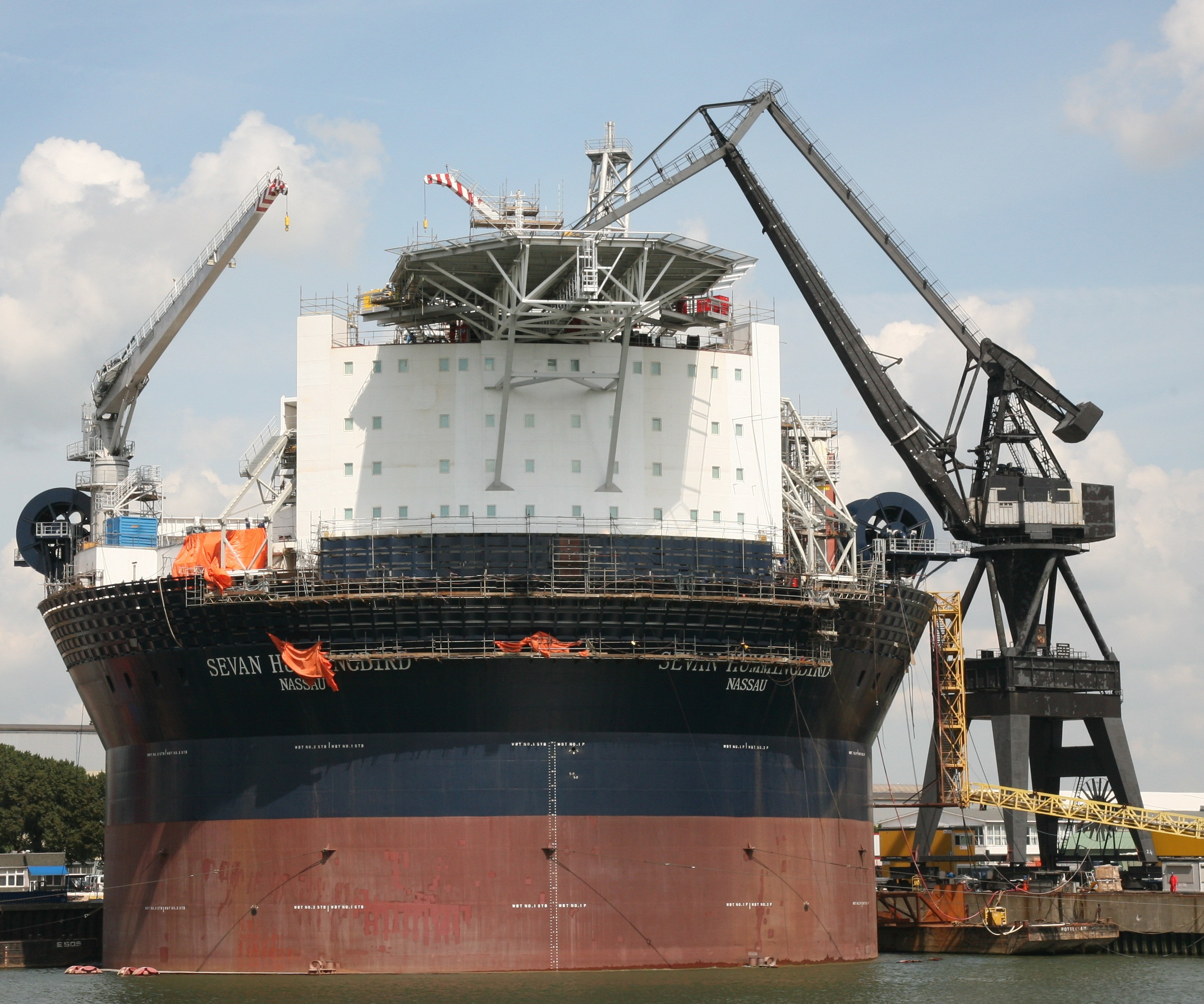 sevan hummingbird